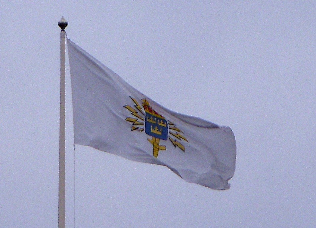 FRA-flagga